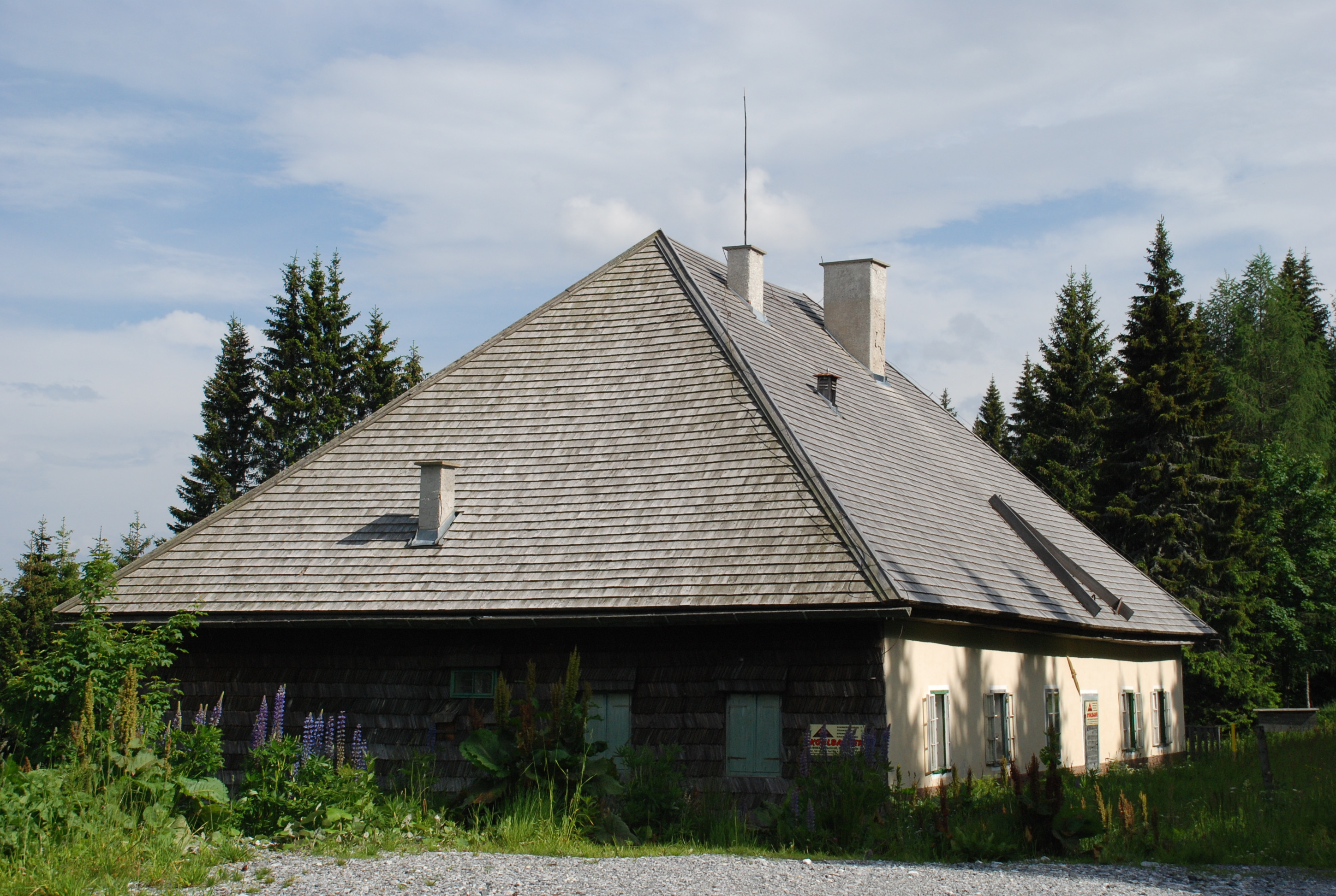 Forsthaus Hebalm neues Dach